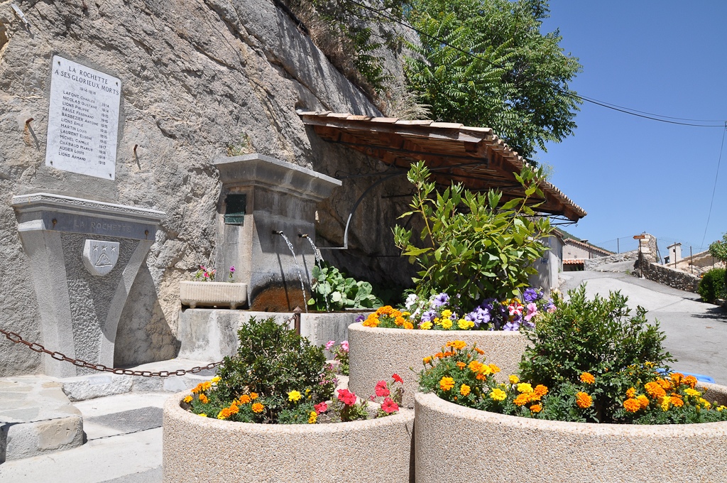 Monument aux morts et fontaine à La Rochette